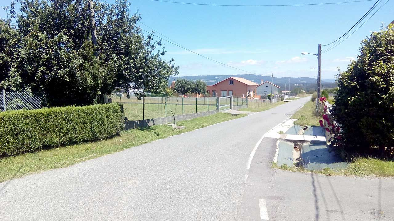 Vista das Chousas, O Val.